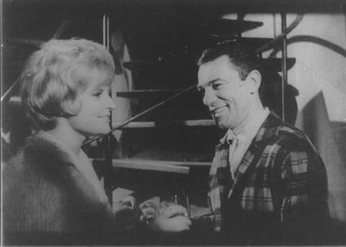 Fotografía blanco y negro sobre papel fotográfico semimate. Escena de la película "Un viaje al más allá" donde aparecen Cristina Berys de perfil derecho, sonriendo, junto a Augusto Bonardo de perfil izquierdo, sonriendo.